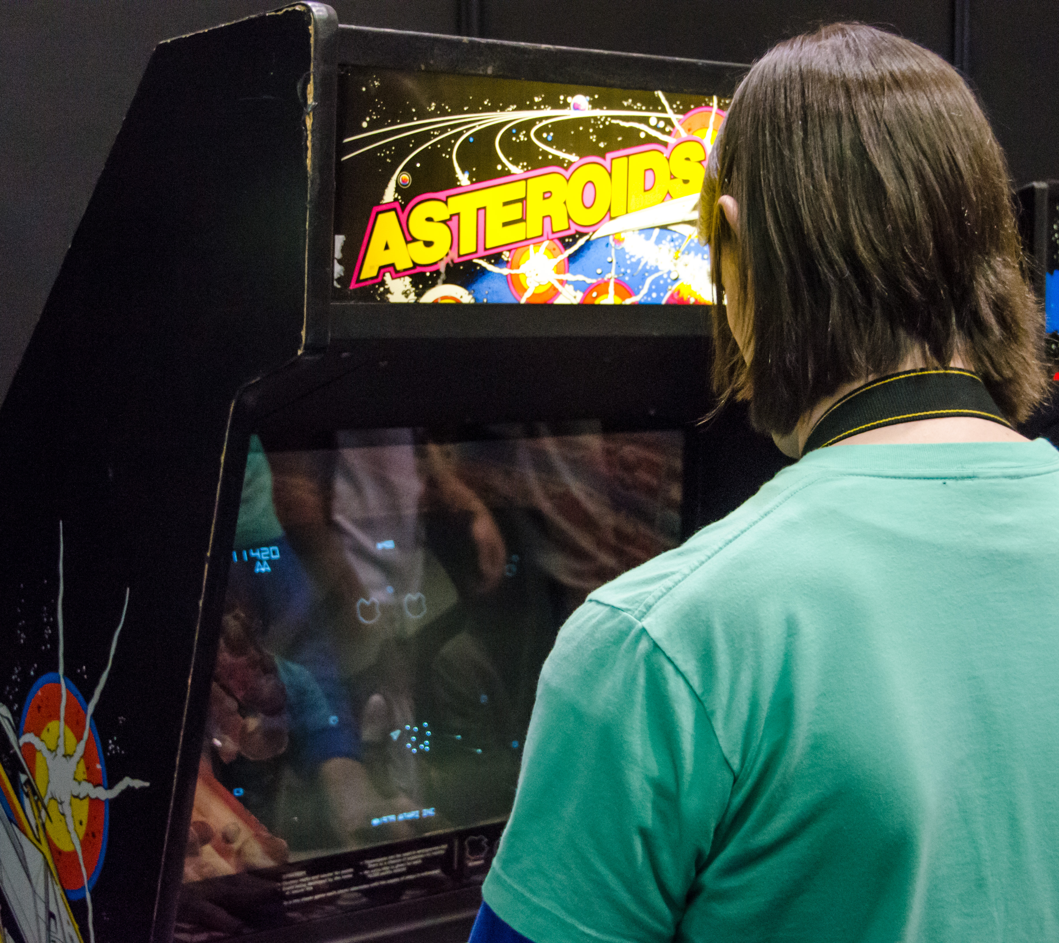 Gamer at E3 2012